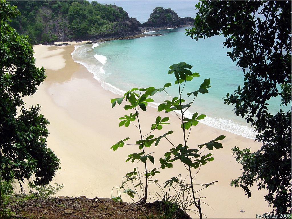 praia do sancho, considerada a mais bonita do brasil